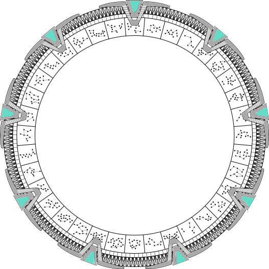 disegno che riproduce in modo dettagliato uno stargate di Pegaso, che ho parzialmente colorato per distinguerlo da quello della Via Lattea